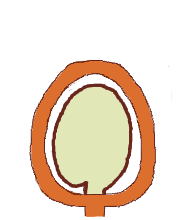 Morfología del fruto, aquenio, sección longitudinal. Según Simpson (2005) Plant Systematics.